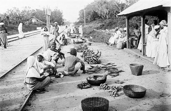 Lawaspoorweg, Station te Lelydorp, omstreeks 1910